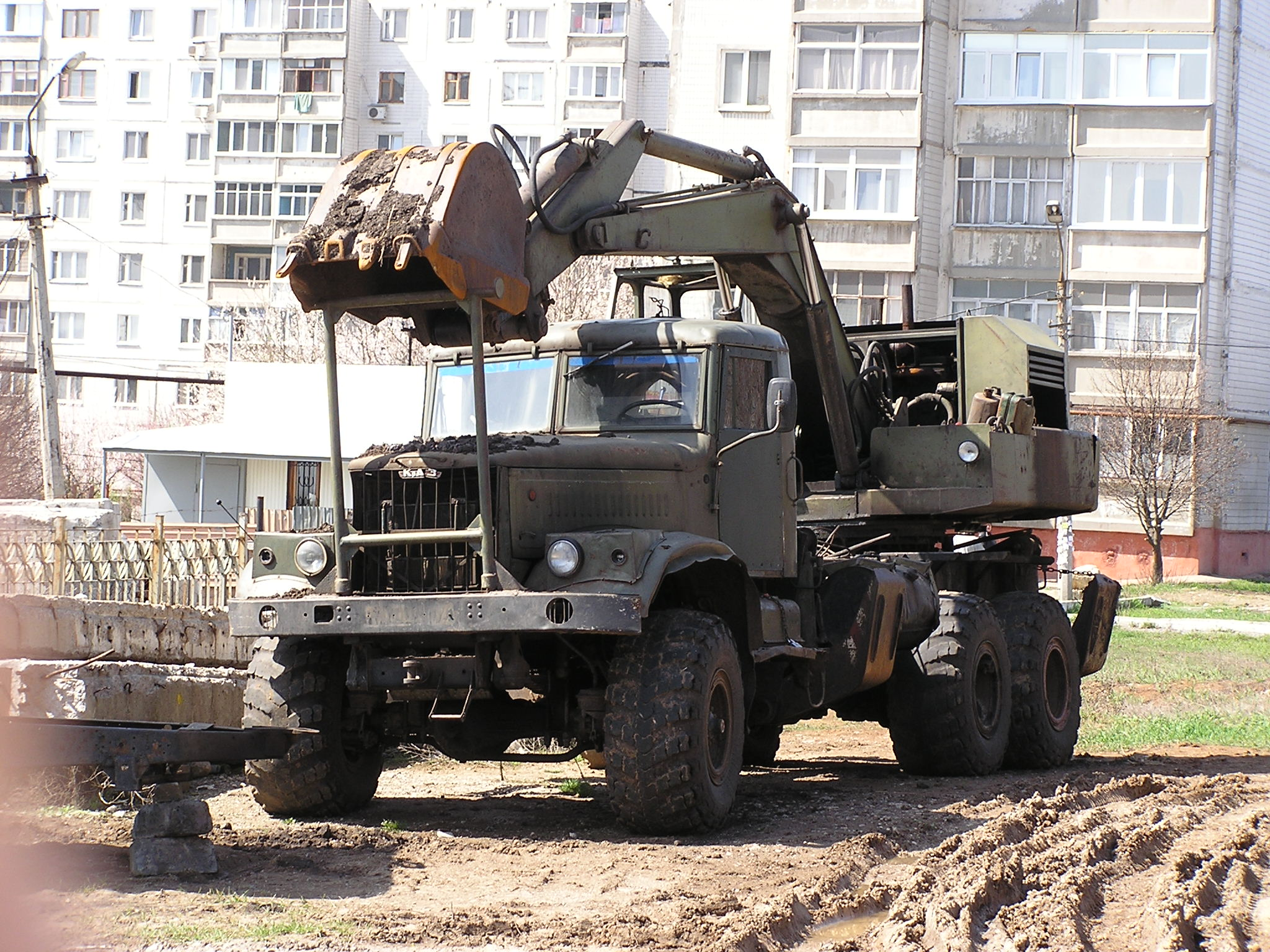 Автомобиль ЭОВ-4421 в Донецке